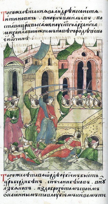 ЛИЦЕВОЙ ЛЕТОПИСНЫЙ СВОД В том же году в Орде был убит царь Бердибек, сын Джанибека, внук Азбяка, с доброхотом своим окаянным Товлубием, князем те[мным и сильным, и с иными советчиками своими. И испил он ту же чашу, которою напоил отца своего и братьев своих.]